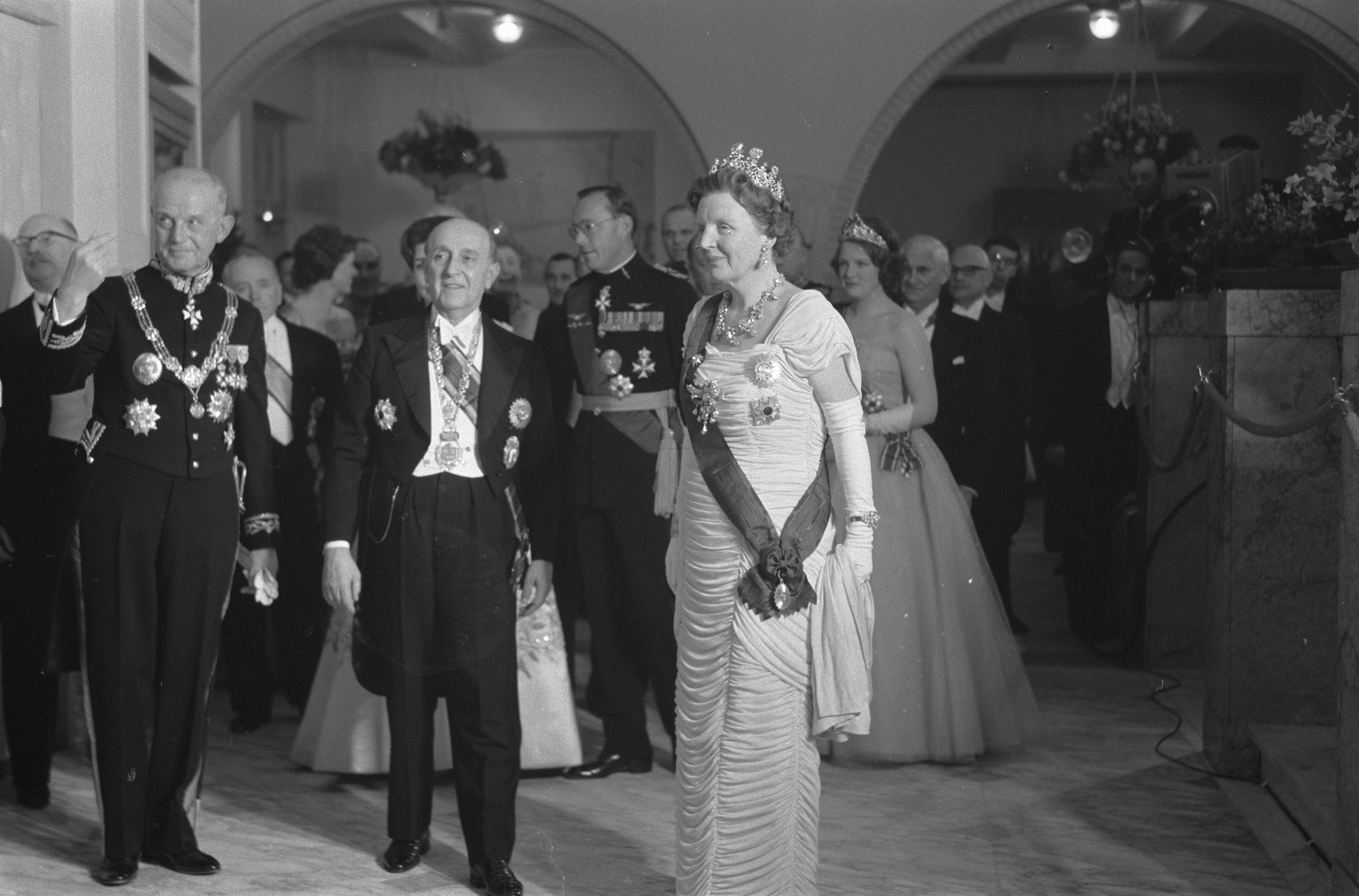 Collectie / Archief : Fotocollectie Anefo Reportage / Serie : [ onbekend ] Beschrijving : Bezoek aan het Koninklijk Schouwburg in Den Haag , de gasten in de hal van de Schouwburg Datum : 7 maart 1960 Locatie : Den Haag, Zuid-Holland Trefwoorden : GASTEN, bezoeken, schouwburgen Instellingsnaam : Koninklijke Schouwburg Fotograaf : Pot, Harry / Anefo Auteursrechthebbende : Nationaal Archief Materiaalsoort : Negatief (zwart/wit) Nummer archiefinventaris : bekijk toegang 2.24.01.05 Bestanddeelnummer : 911-0742